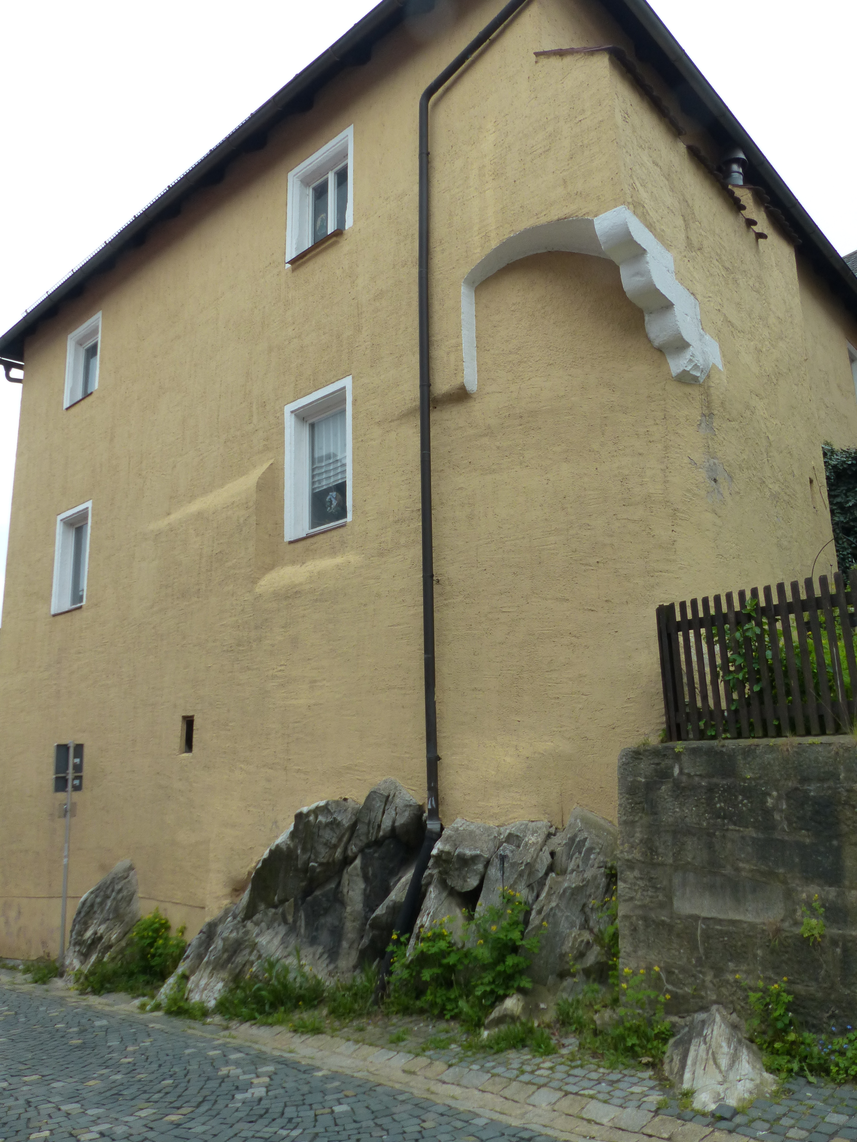 Marmor-Aufschluss im Burggraben Wunsiedel